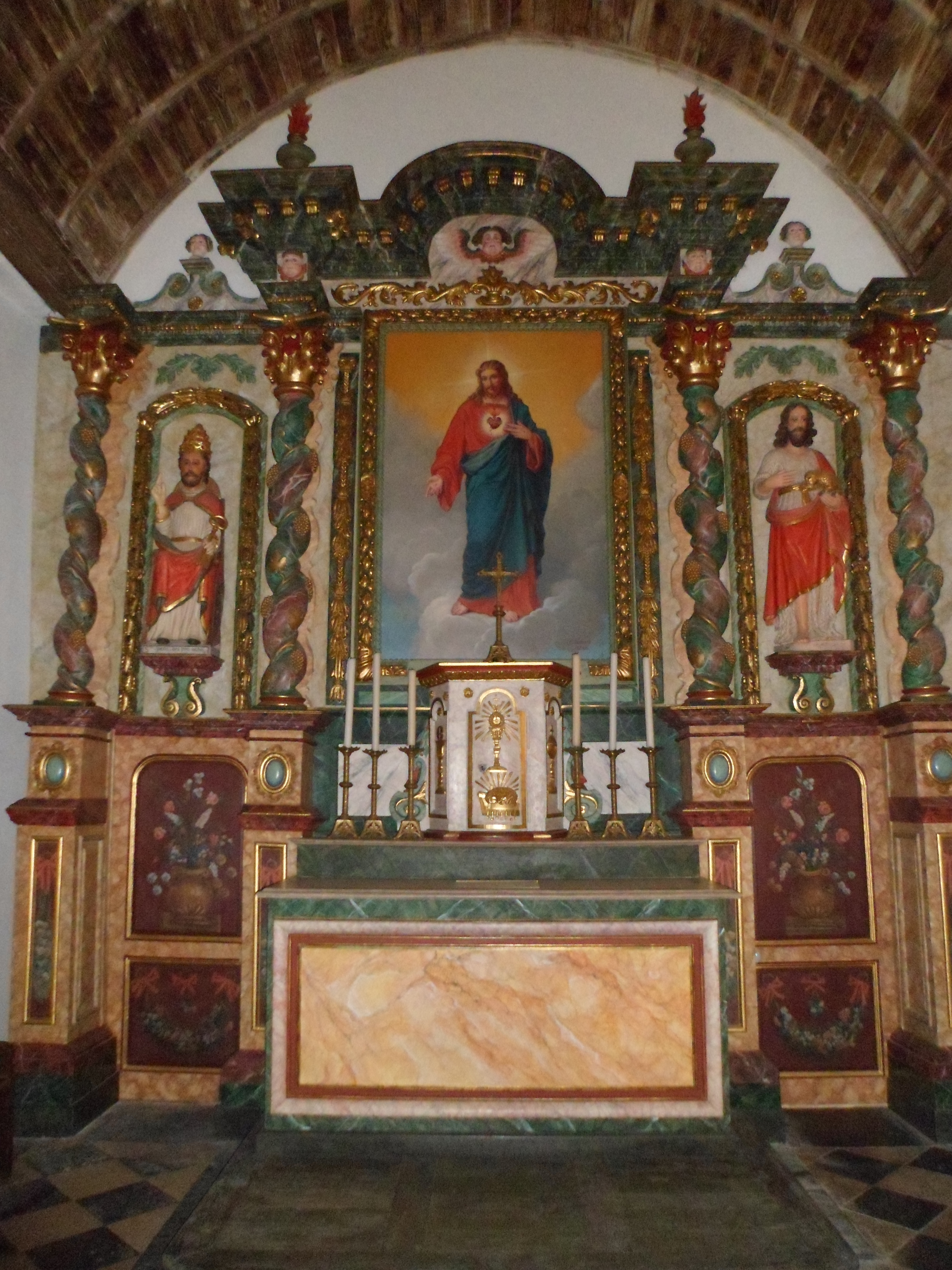 église Saint-Pierre du Mesnil-Herman